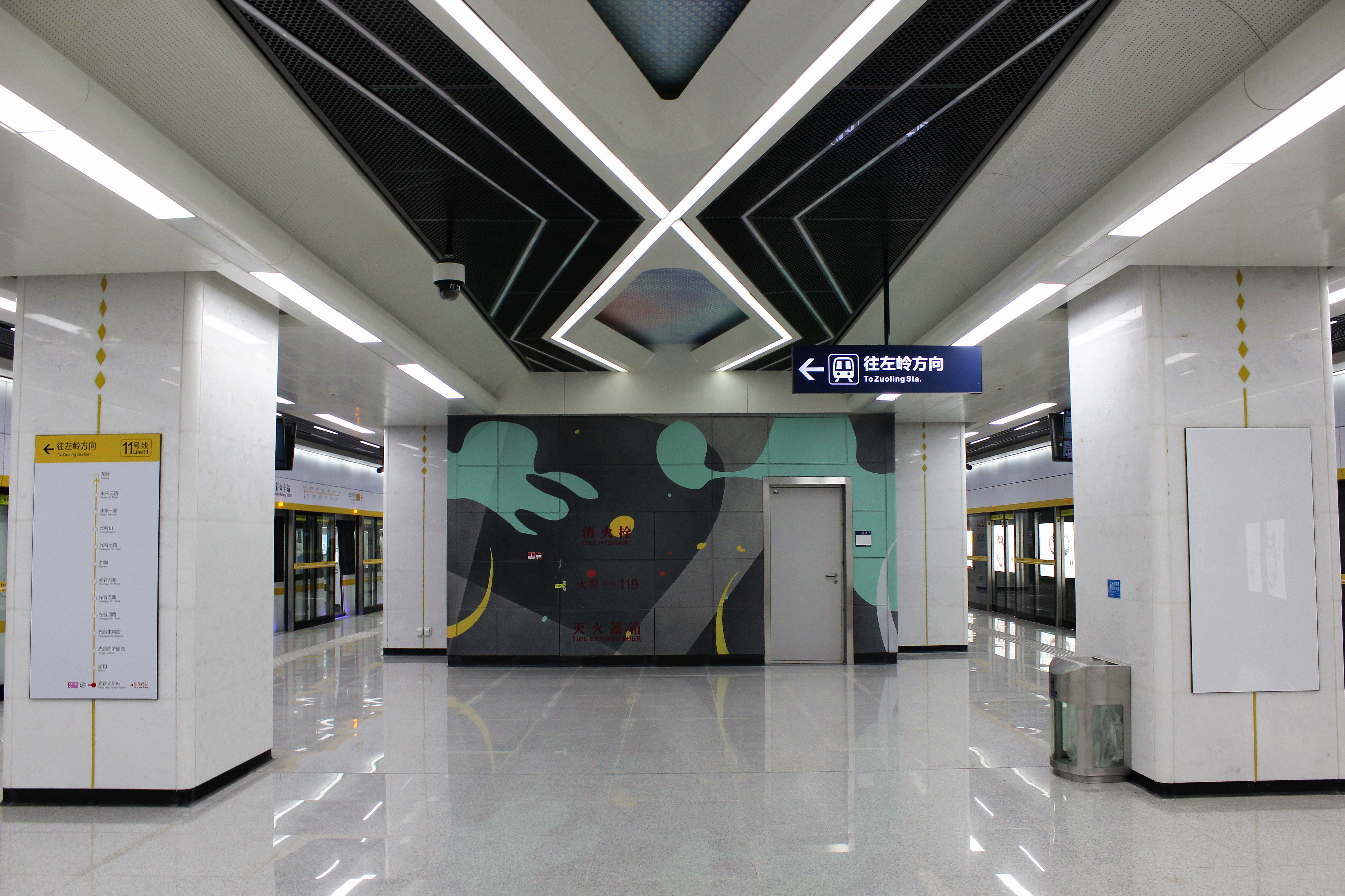 中文（中国大陆）: 武汉轨道交通11号线光谷火车站